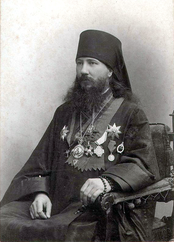 Епископ Гродненский Михаил (Ермаков)